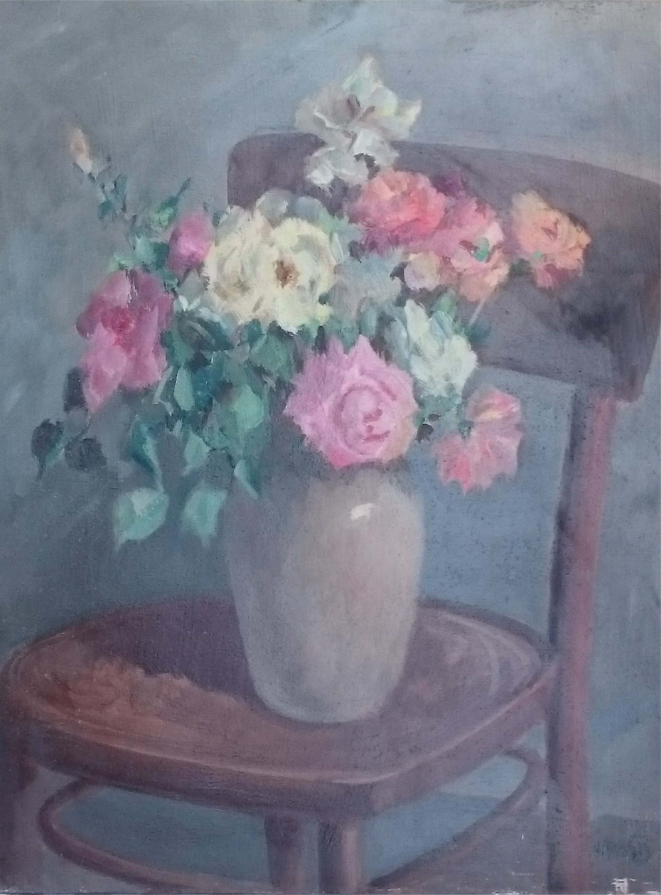 Sedia con Rose (1952)